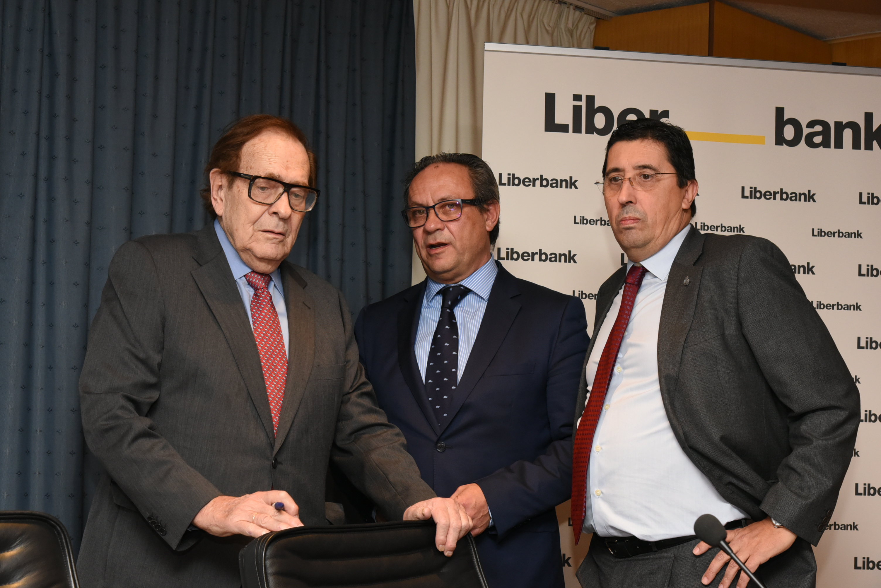 Toledo.12-11-15. El consejero de Hacienda y Administraciones Públicas, Juan Alfonso Ruiz Molina, ha clausurado el acto institucional con el que la Sección de Toledo del Colegio de Economistas de Madrid conmemora el Día del Economista. Fotos:(Jose Ramon Marquez//.jccm)